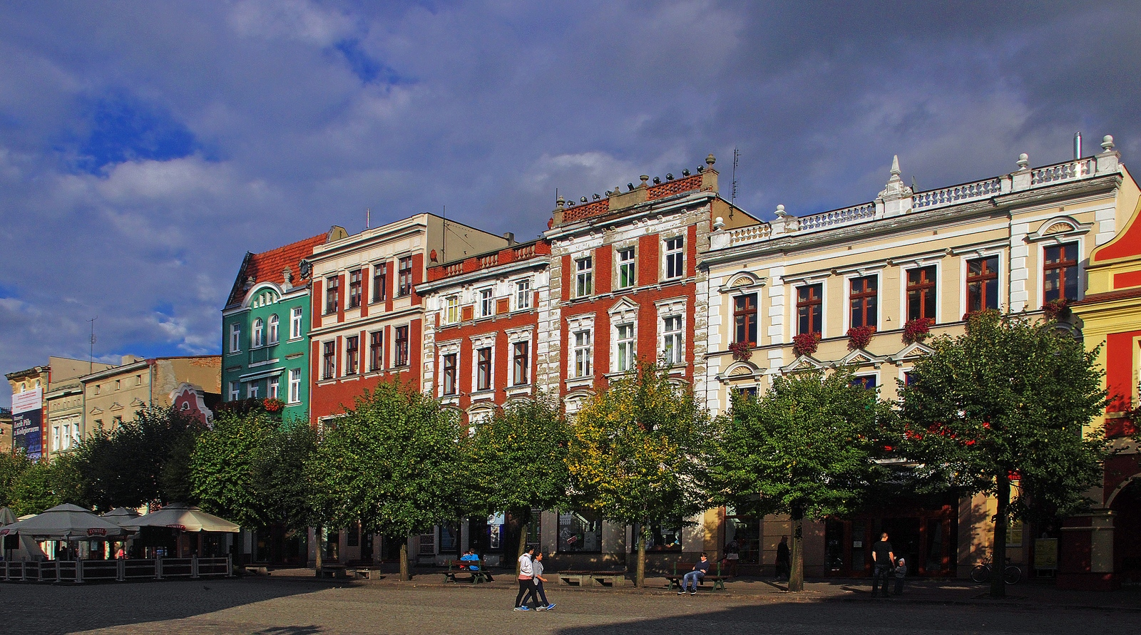 Stary Rynek z 1. połowy XVI w. (wypis z księgi rejestru) Leszno, miasto Leszno